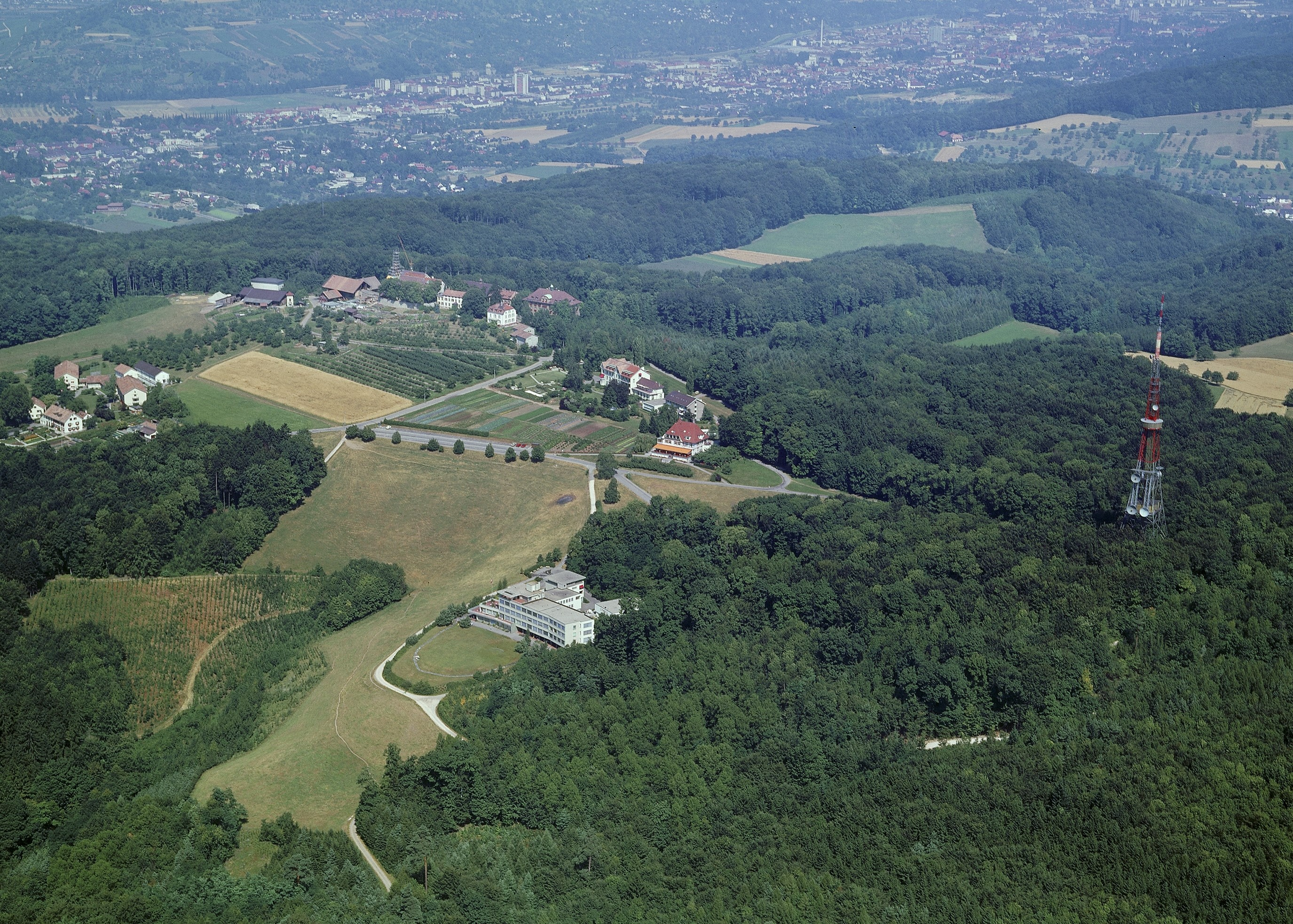 Luftbild des alten Sendeturms auf St. Chrischona bei Basel, links vom Turm die Gemeinde St. Chrischona, am oberen Bildrand ist Lörrach und der Ortsteil Stetten zu sehen